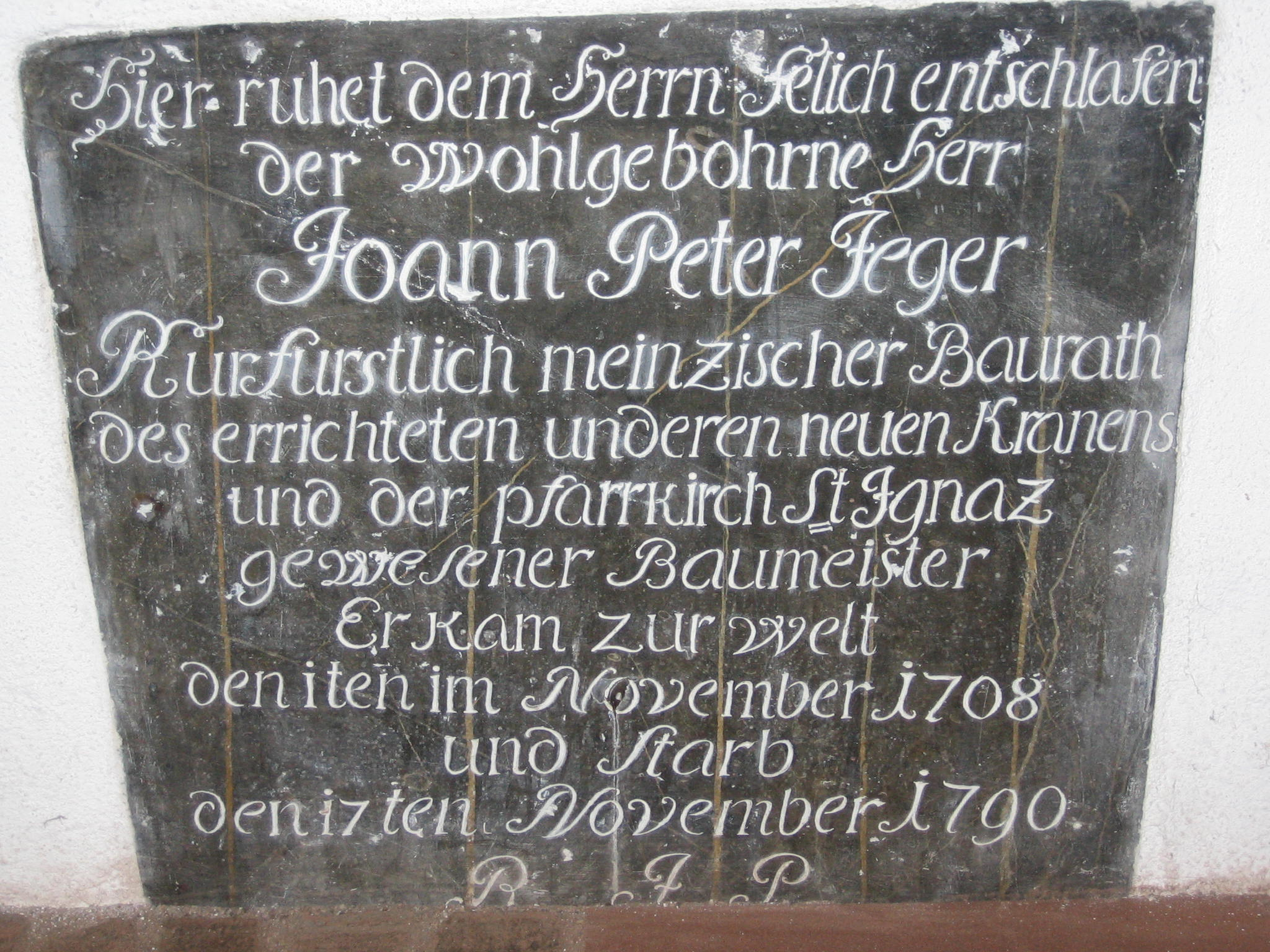 Grabplatte des Hofstuckateurs Johann Peter Jäger, in St. Ignaz, Mainz